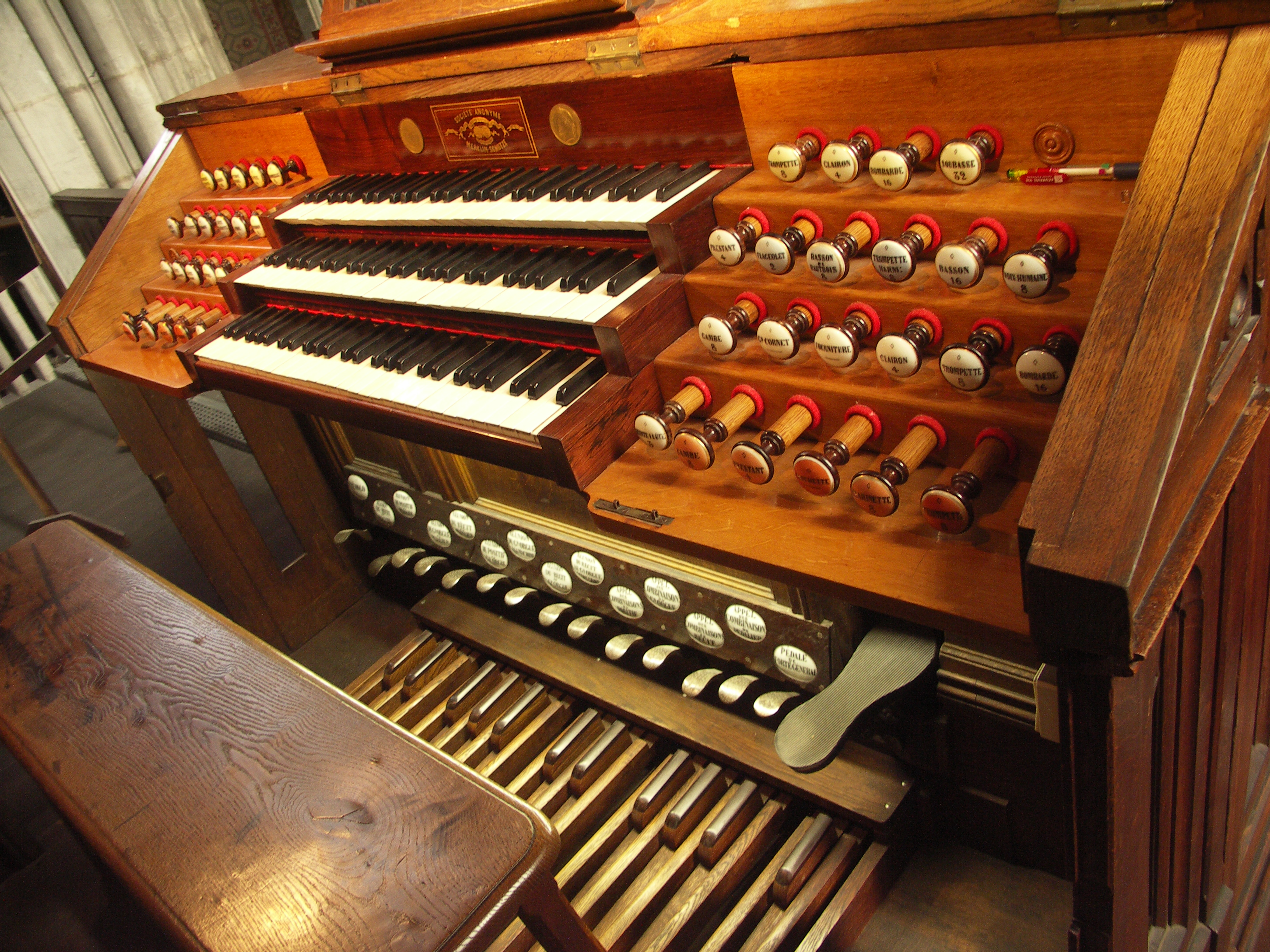 Console du grand orgue Merklin-Schütze (1867) de la basilique Saint-Epvre de Nancy (54, Meurthe-et-Moselle, France).